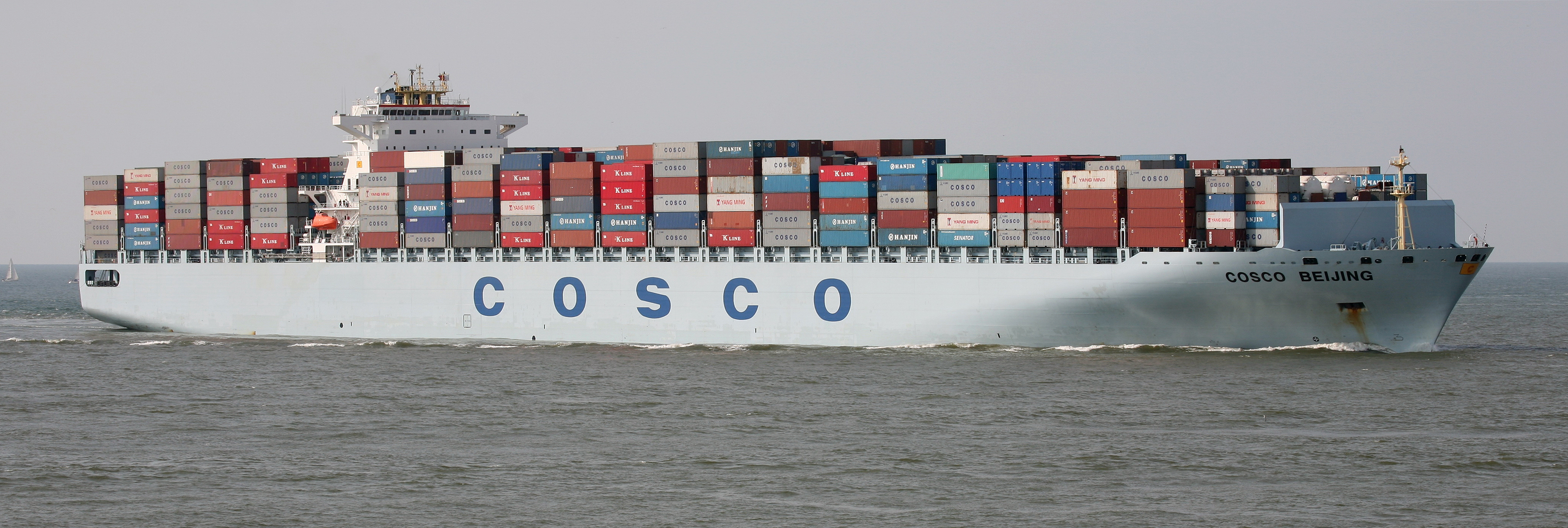 Containerschiff COSCO Beijing auf Fahrt in der Maasebene.